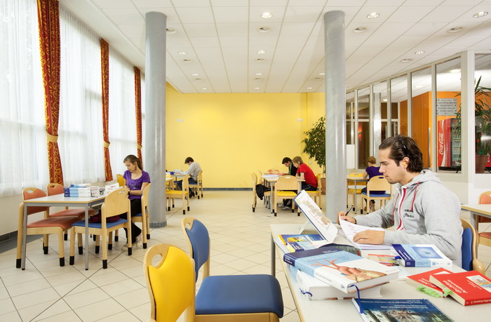 Arbeitsräume im Studentenhaus